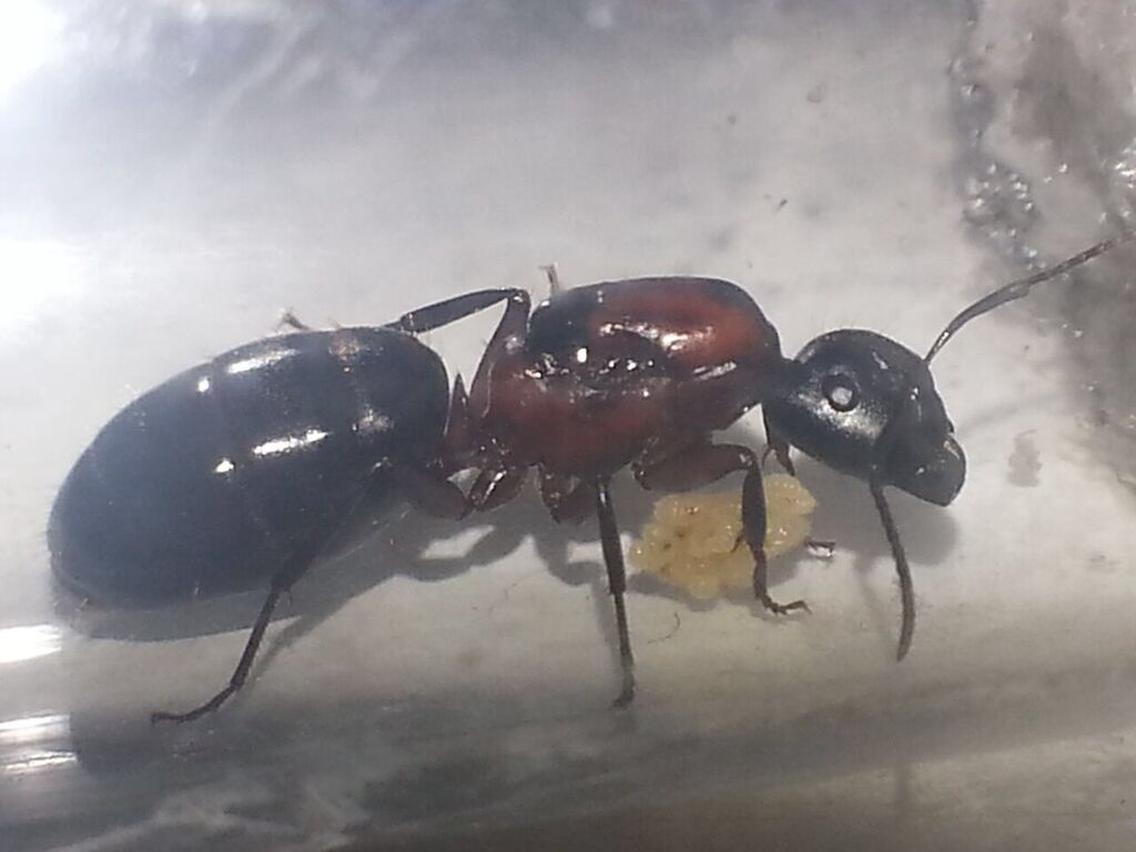 Reine Camponotus novaeboracensis en tube, élevage de fourmis, myrmecologie.